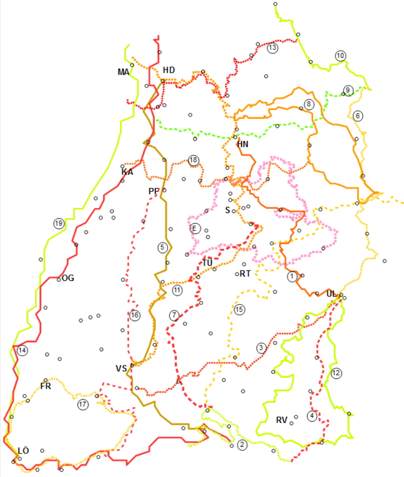 Radrouten BW